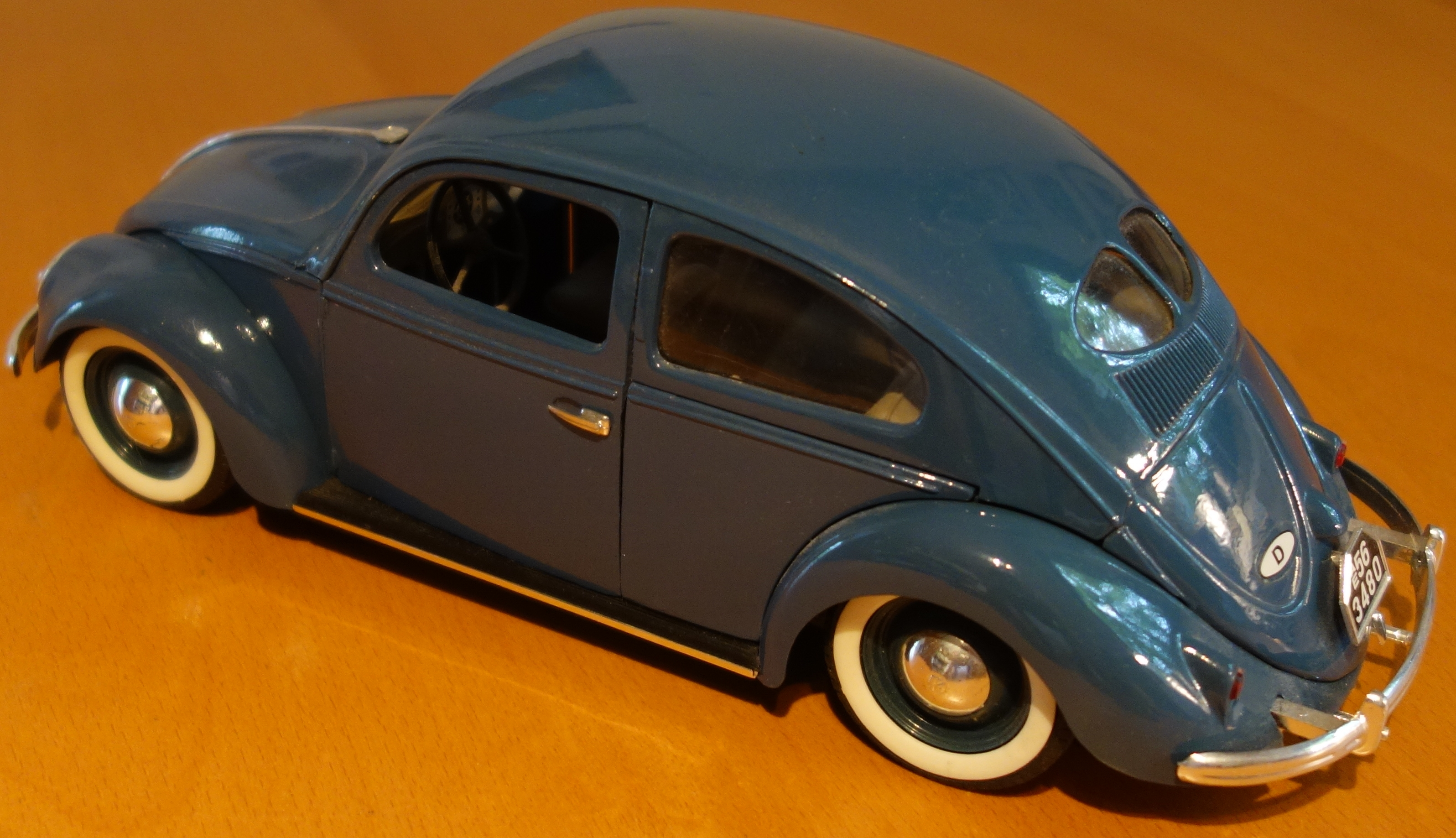 Volkswagen Anfang 1950er-Jahre mit “Brezel”-Heckfenster